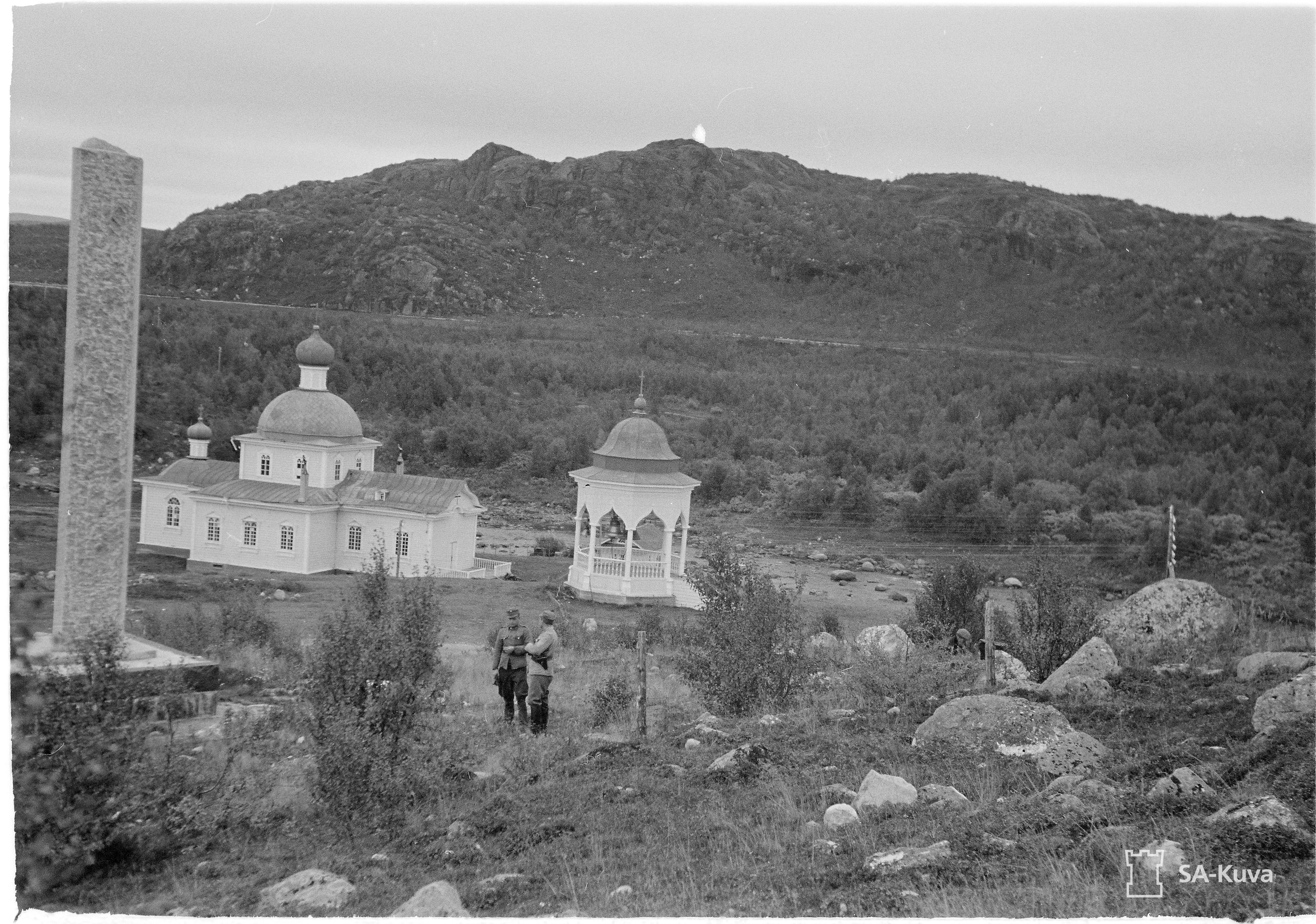 Petsamon Alaluostarin evankelisluterilainen kirkko ja kellotapuli.